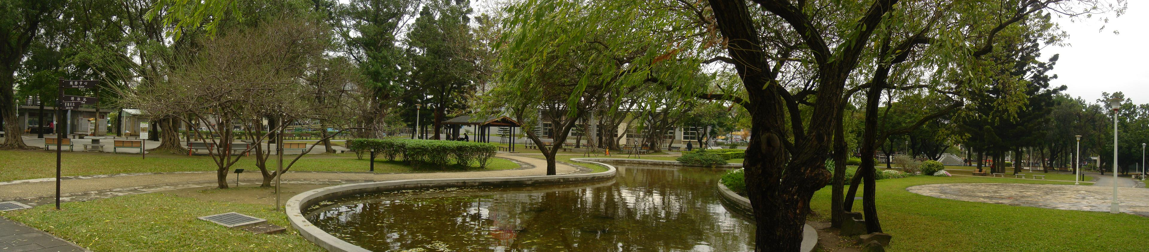 中文（台灣）: 臺北市民權東路三段旁，榮星公園內精緻花園廣場旁的水池與梅花。